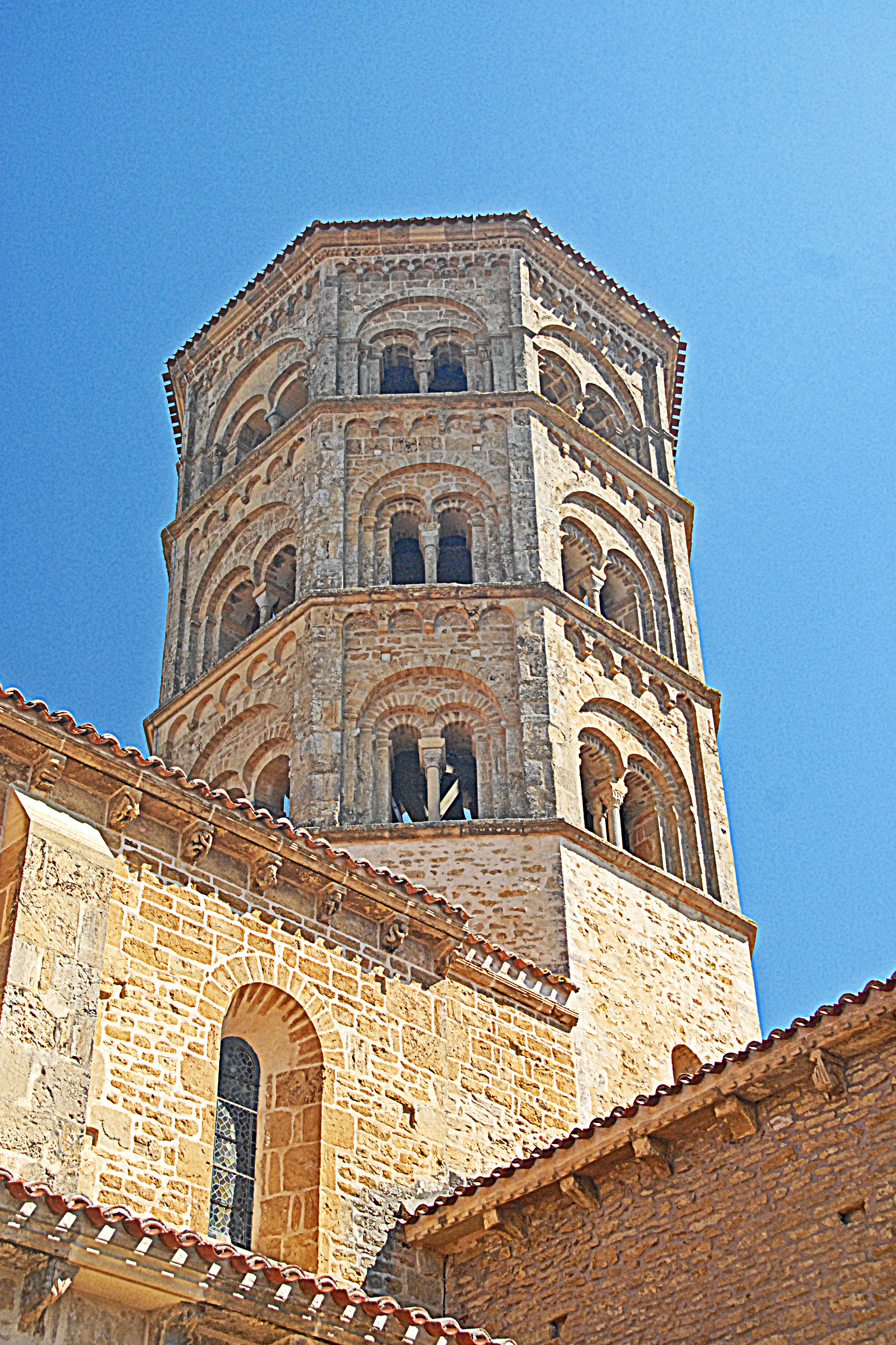 Vierungsturm von SW